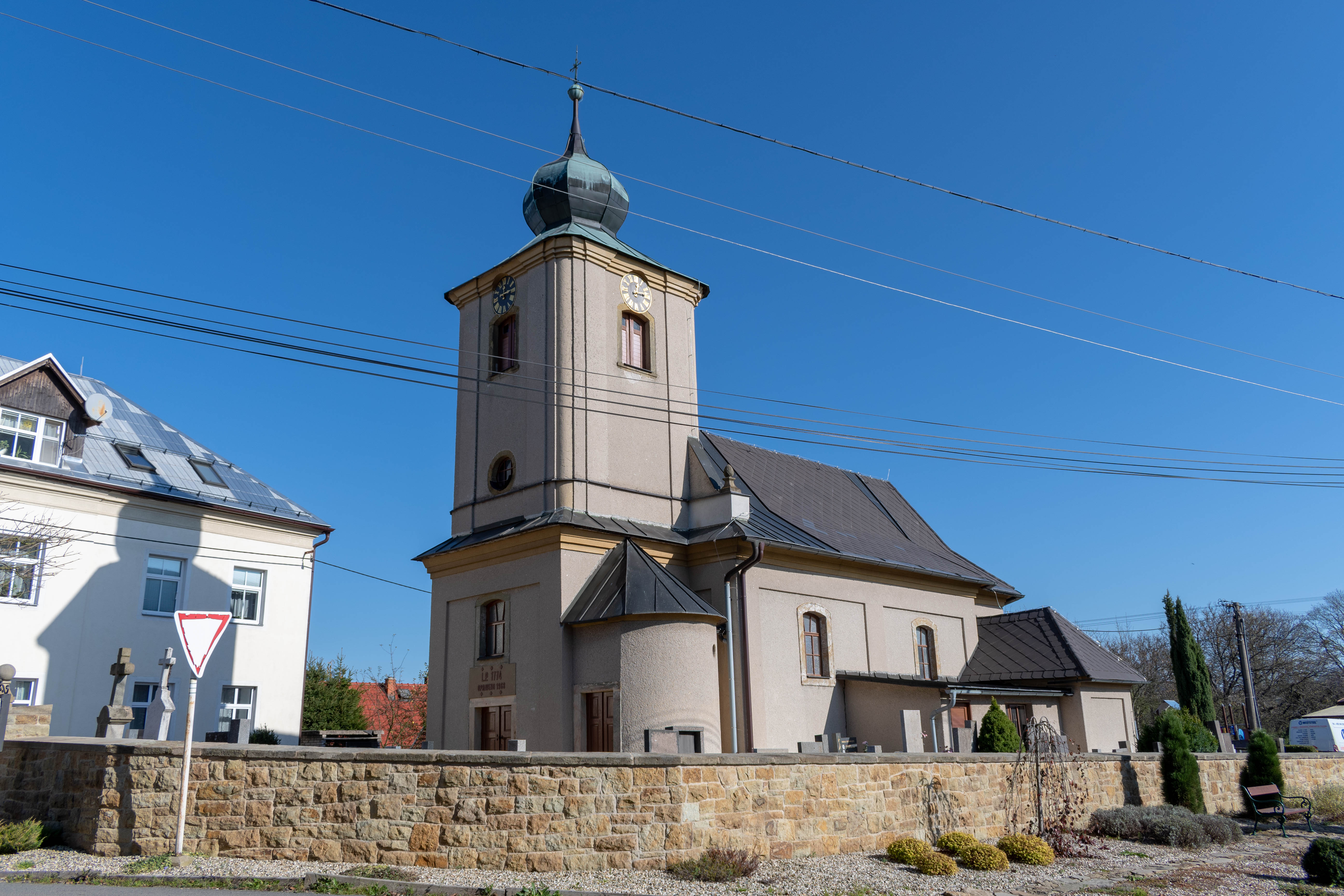 Kostel svatého Prokopa v obci Sobkovice